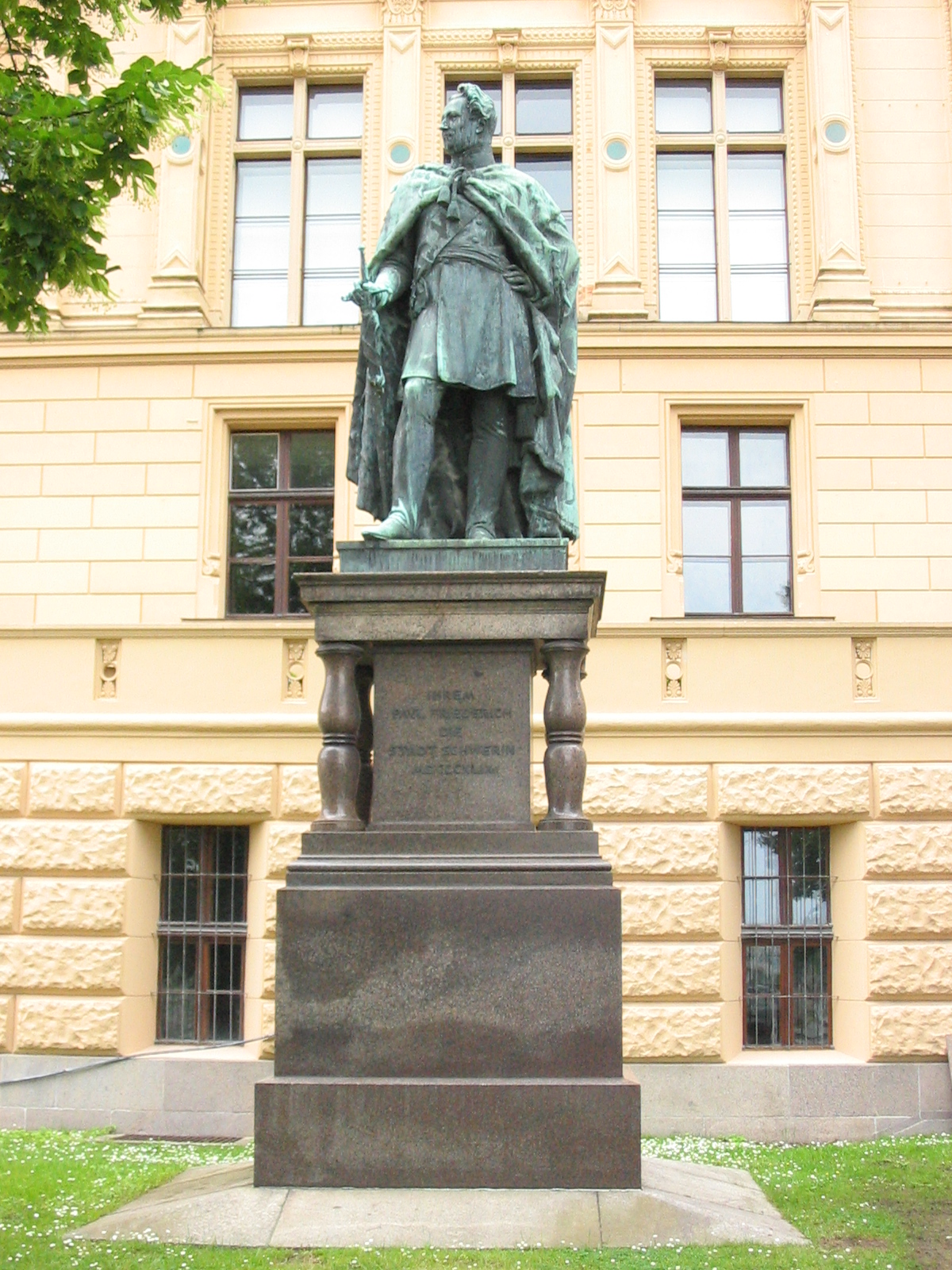 Denkmal/memorial Paul Friedrich, Schwerin (Germany), Schloss